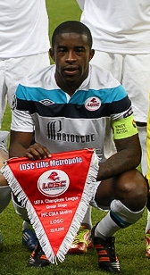 Photo de face de Rio Mavuba, capitaine du LOSC Lille Métropole, avant la rencontre contre le CSKA Moscou